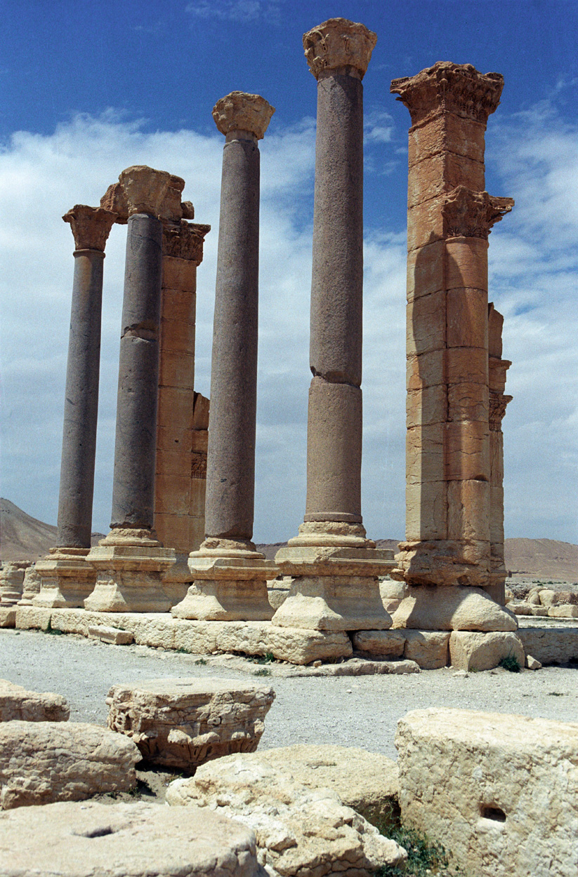 Palmyra, Zenobia's Bath